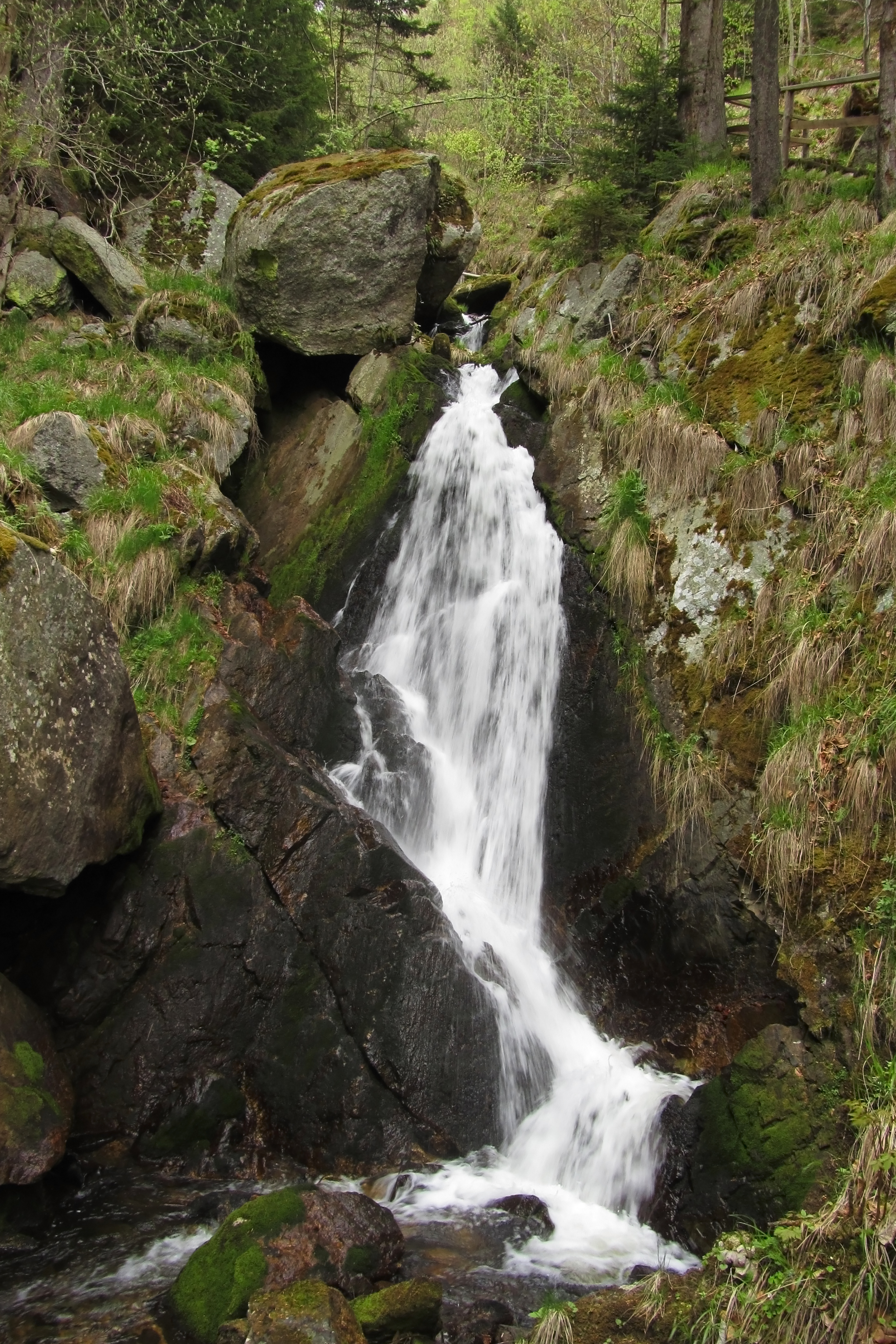 Die im Weinsberger Wald entspringende Große Ysper überwindet in der Ysperklamm auf einer Länge von 1,2 Kilometer einen Höhenunterschied von ca 300 Meter. Bis zum Jahr 1929 wurde die Klamm zu Holztrift benutzt, das Wasser dafür in dem im Jahr 1599 angelegten Ödteich oberhalb der Klamm gesammelt. Im Jahr 1956 brach der Damm nach der Schneeschmelze. Die Stege in der 1952 zum Naturdenkmal erklärten Klamm wurden wieder errichtet, der Teich (nicht denkmalgeschützt, weil künstlich angelegt) wurde zugeschüttet. This media shows the natural monument in Lower Austria with the ID ME-028.